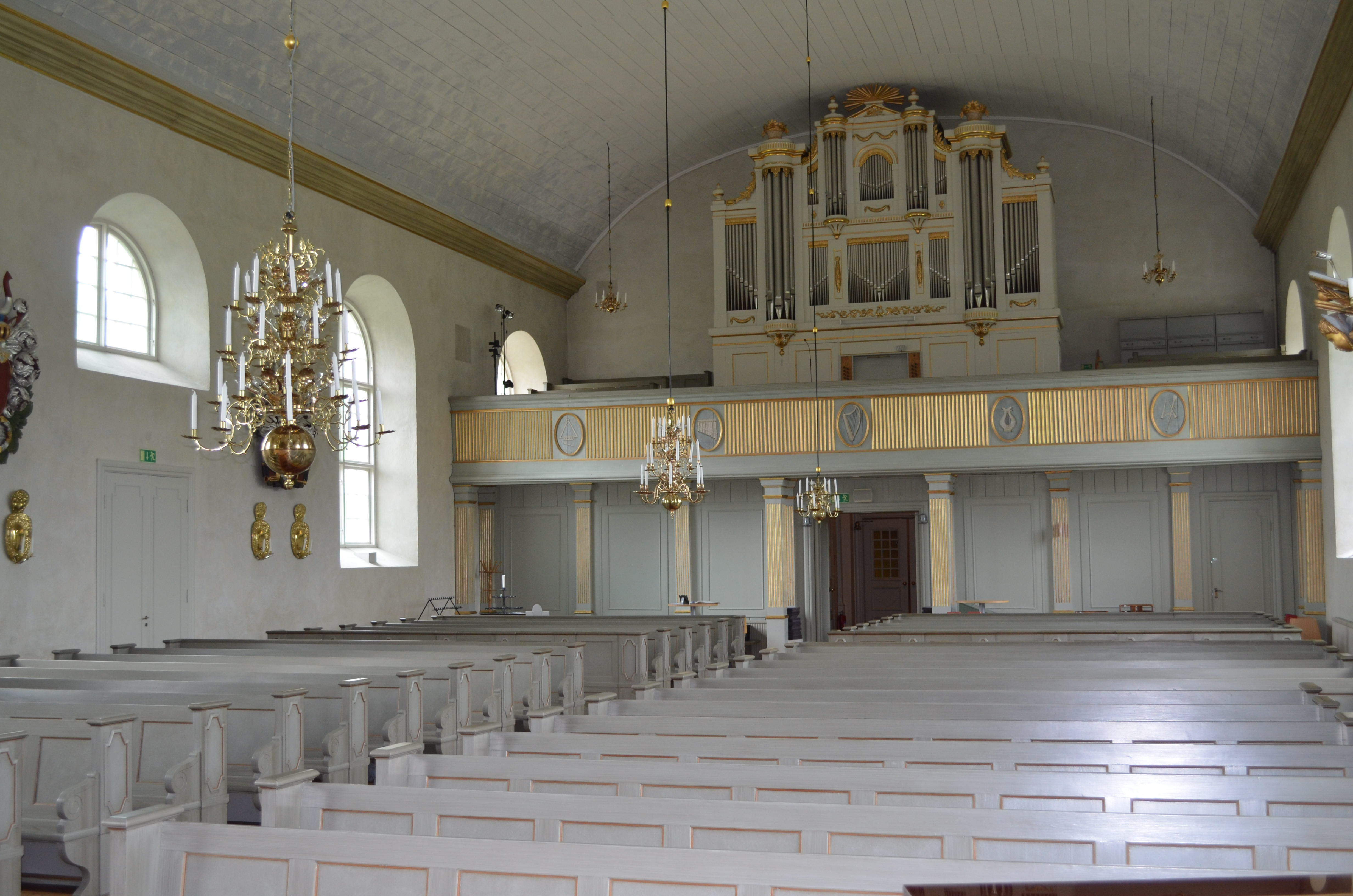 Orgelläktarenj